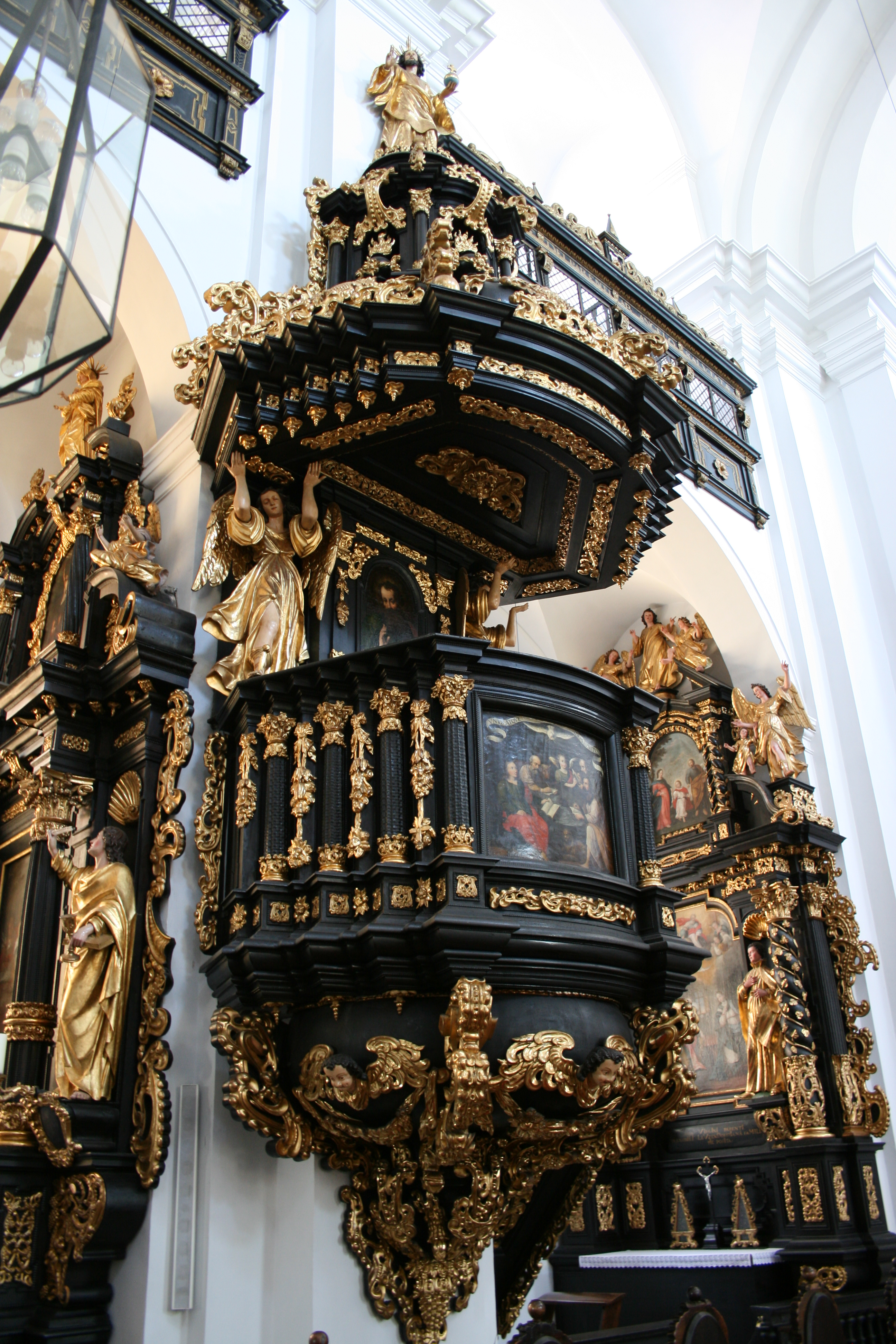 Kanzel der Pfarrkirche Leoben-St. Xaver